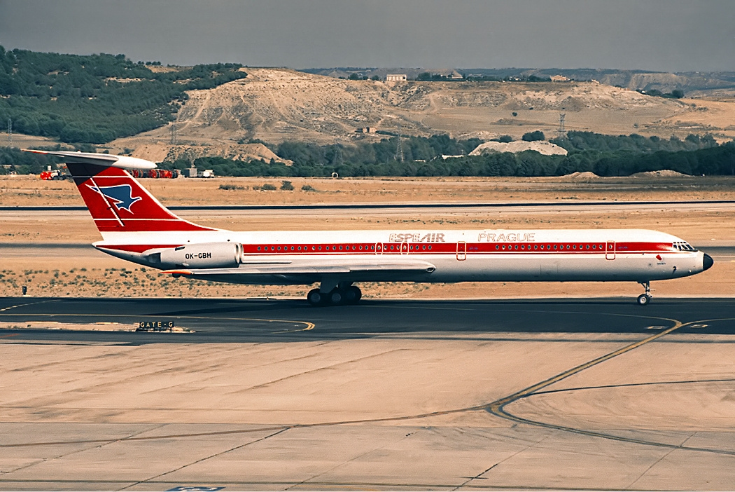 Espe Air Prague Ilyushin Il-62